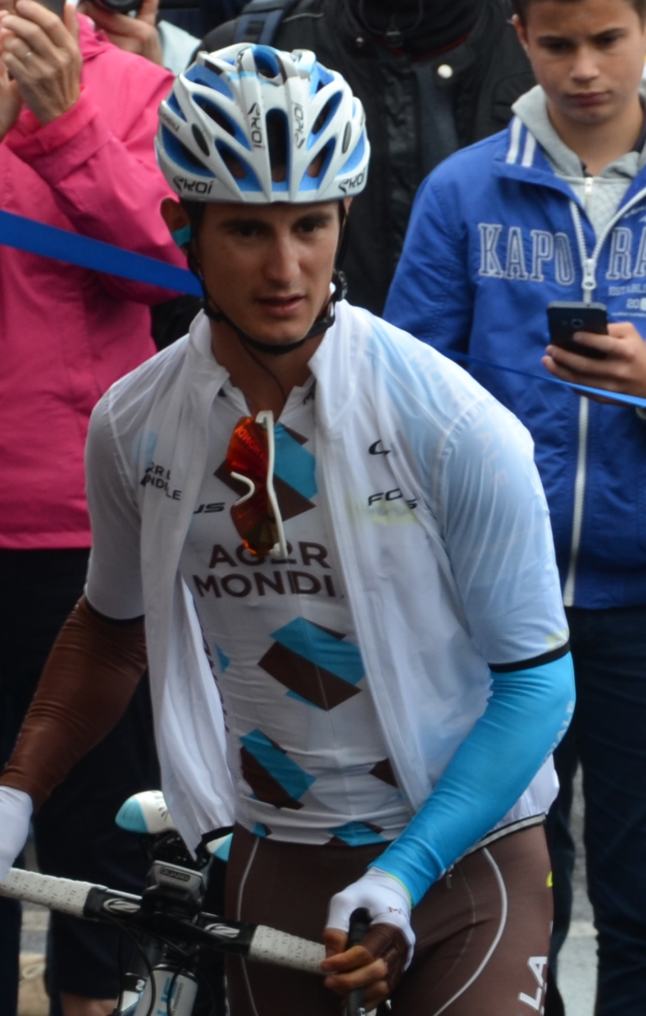 Alexis Vuillermoz au départ de la 2e étape du Tour de France 2016.